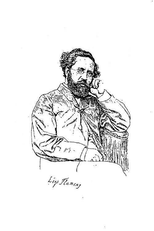 Portrait d'Eugène Manuel par Léopold Flameng, frontispice du livre : Eugène Manuel, Poésies du foyer et de l'école, Calmann-Lévy, 1888